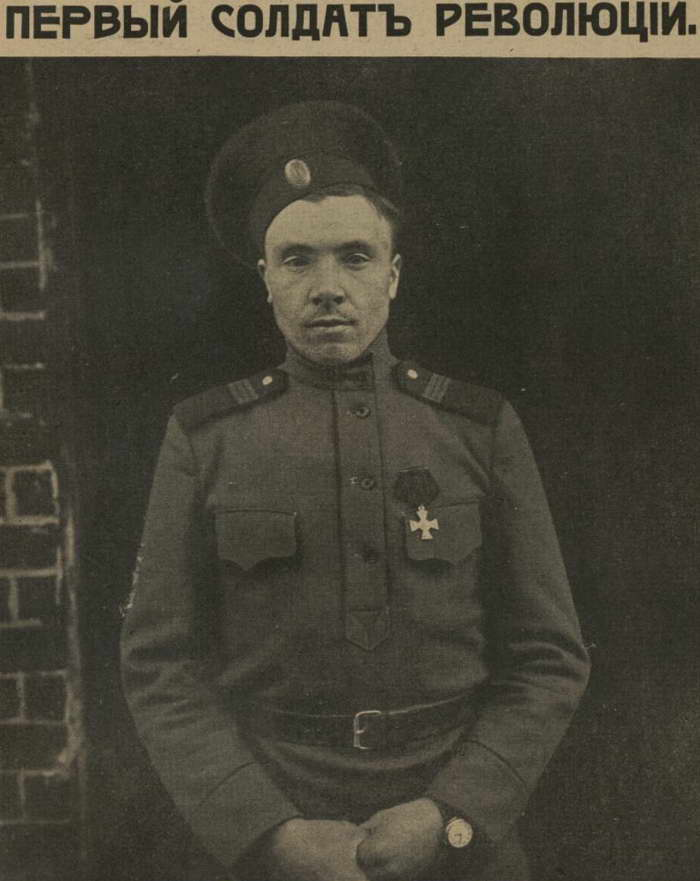 Унтер-офицер учебной команды запасного батальона лейб-гвардии Волынского полка Кирпичников Т. И. Во время событий Февральской революции в Петрограде поднял восстание в своём полку, начав тем самым массовый переход солдат на сторону революции. Скан из петроградской газеты 1917 года.